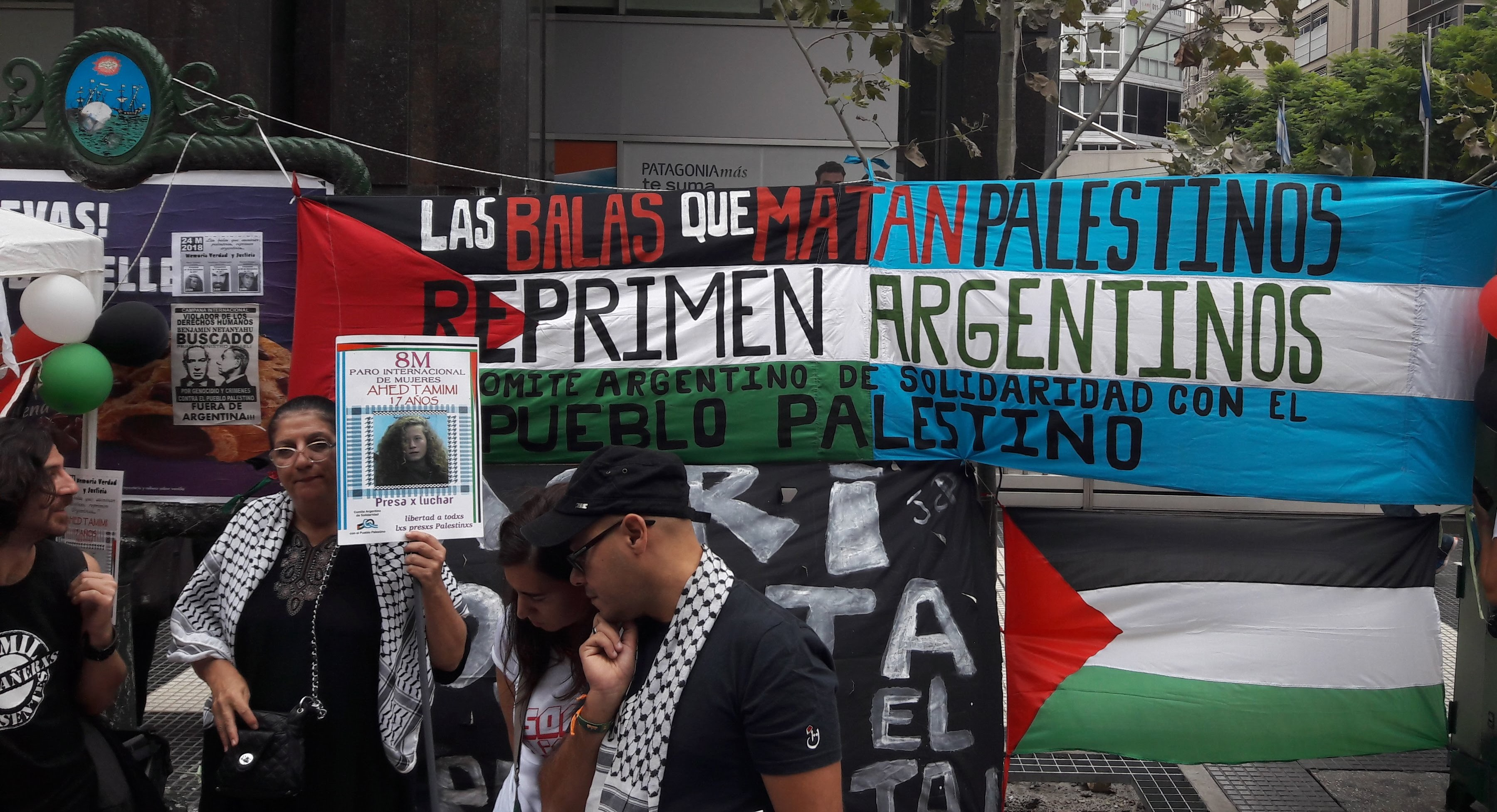 24M Marcha de la Memoria por la Verdad y Justicia en Buenos Aires, Argentina.